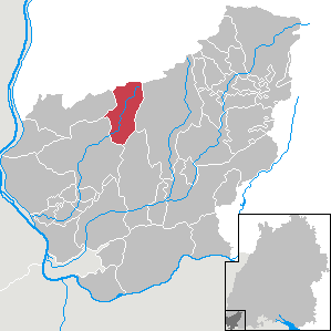 Malsburg-Marzell, Landkreis Lörrach, Baden-Württemberg